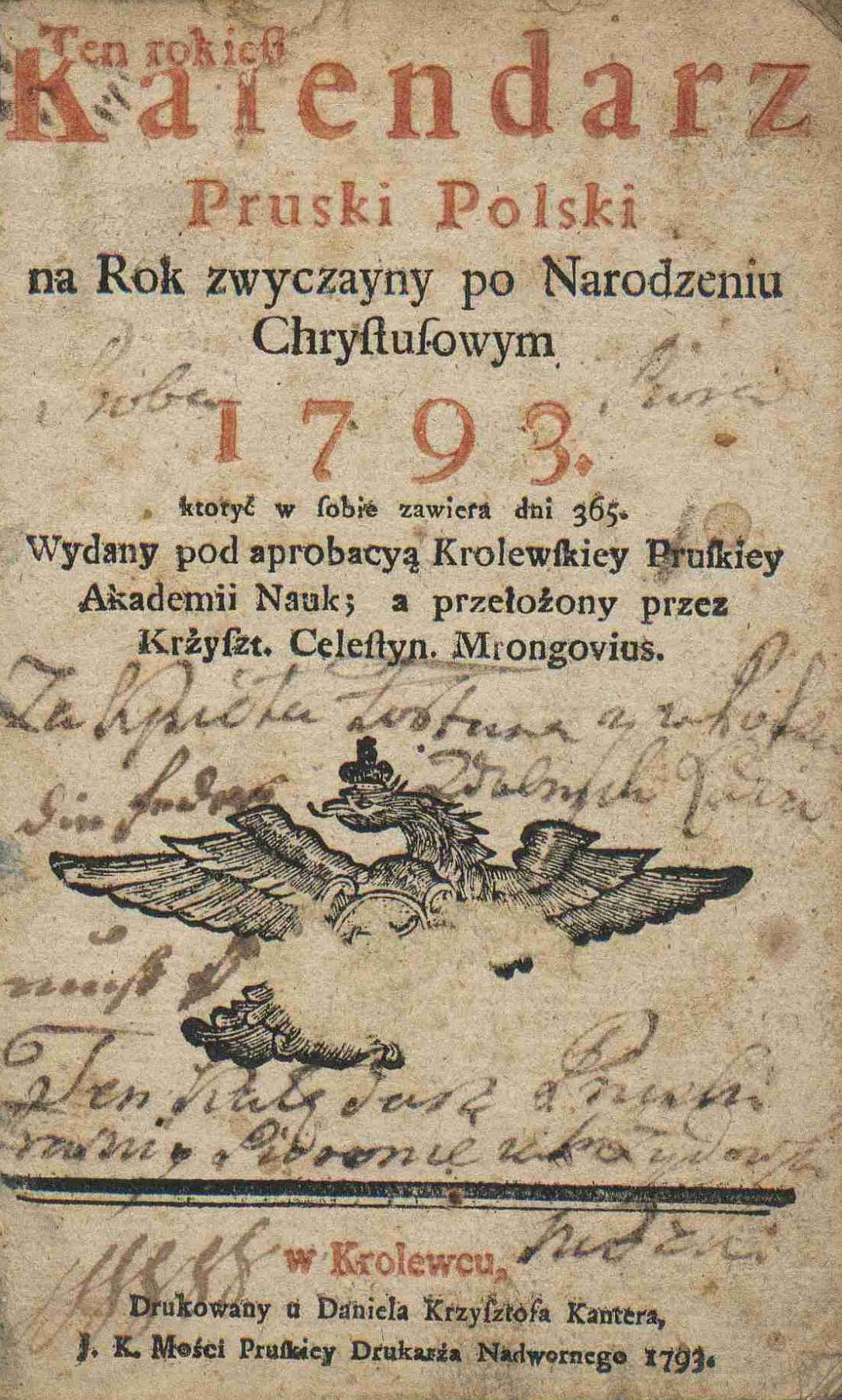 Mrongowiusz Krzysztof Celestyn, "Kalendarz Pruski Polski na rok zwyczayny po Narodzeniu Chrystusowym 1793 : który w sobie zawiera dni 365", Królewiec 1793.